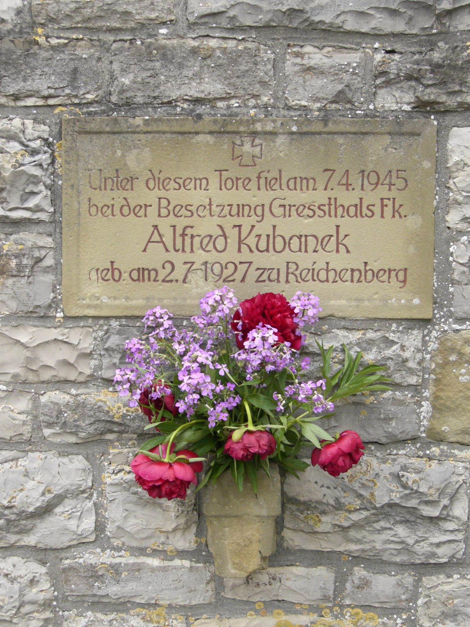 Gedenktafel an den Gefallenen Kubanek am Ende des 2. Weltkrieges in Greßthal